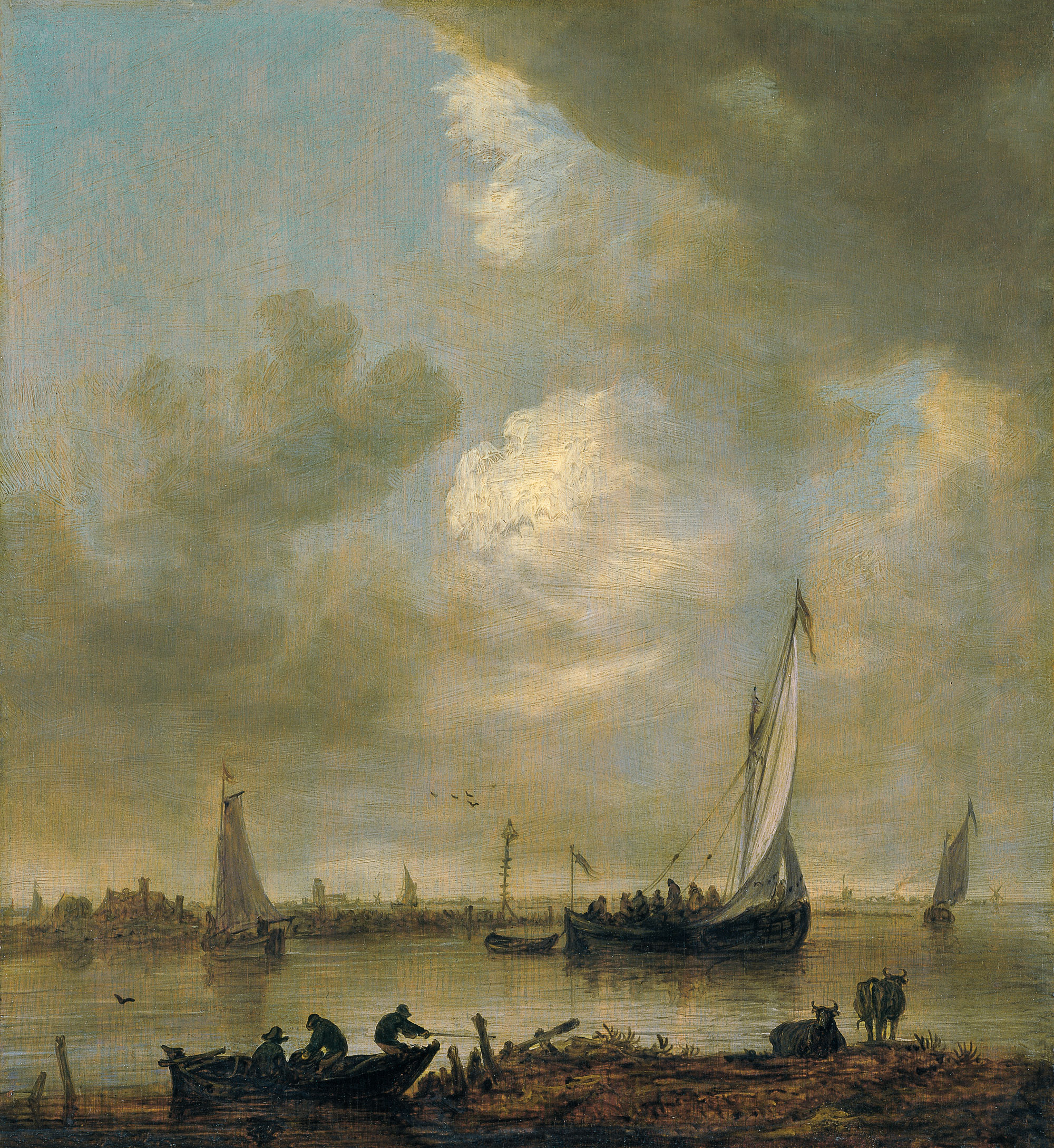 Smalschip is de benaming van oude Nederlandse koopvaardij- en binnenvaartzeilschepen die smaller waren dan 16 voet 16 duim, oftewel 4.68 meter, waardoor ze door de Donkere Sluis in Gouda konden varen. Schepen die dat niet konden waren de wijdschepen.